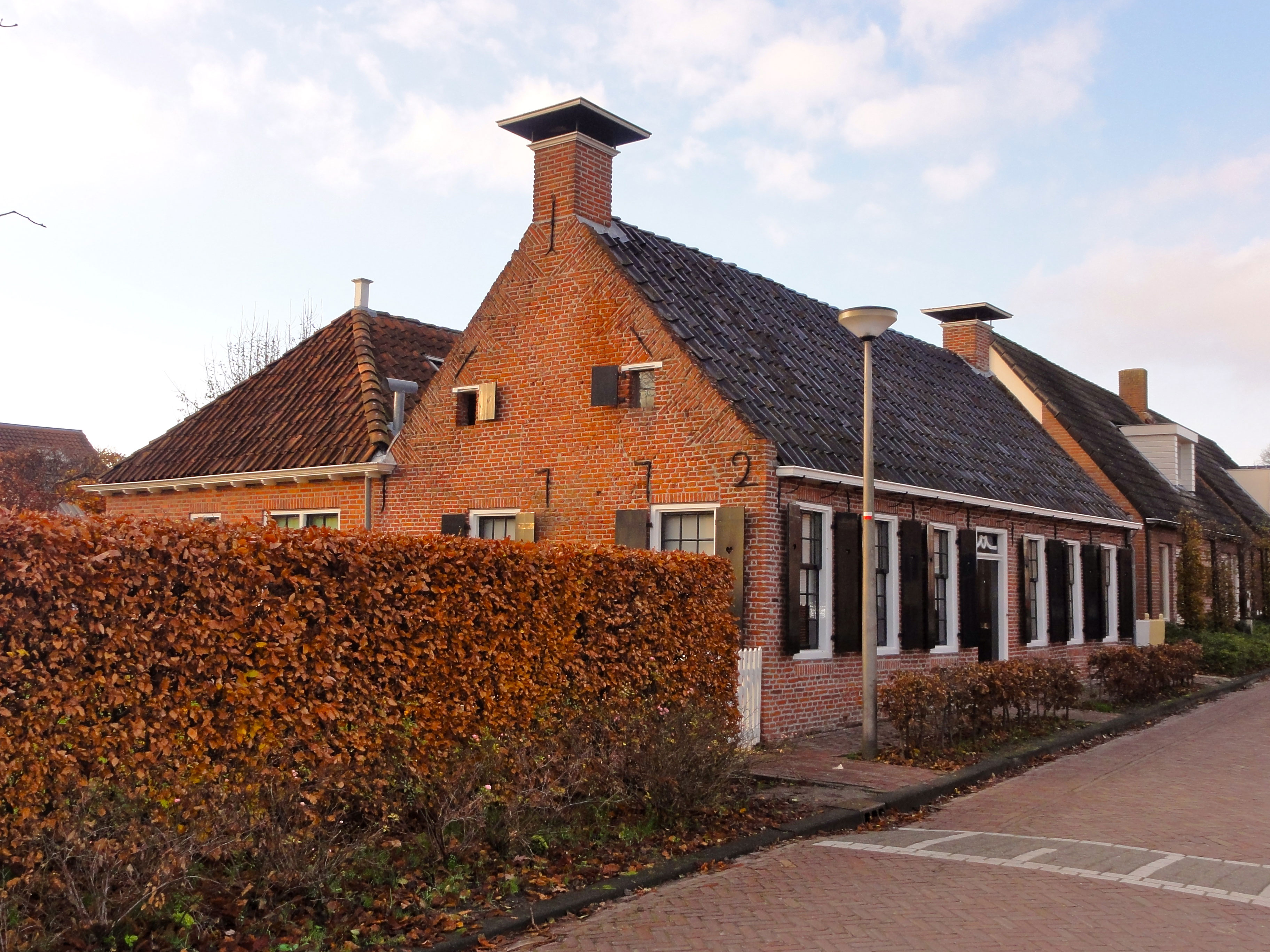 Woonhuis Zuster A. Westerhofstraat 47 te Leens